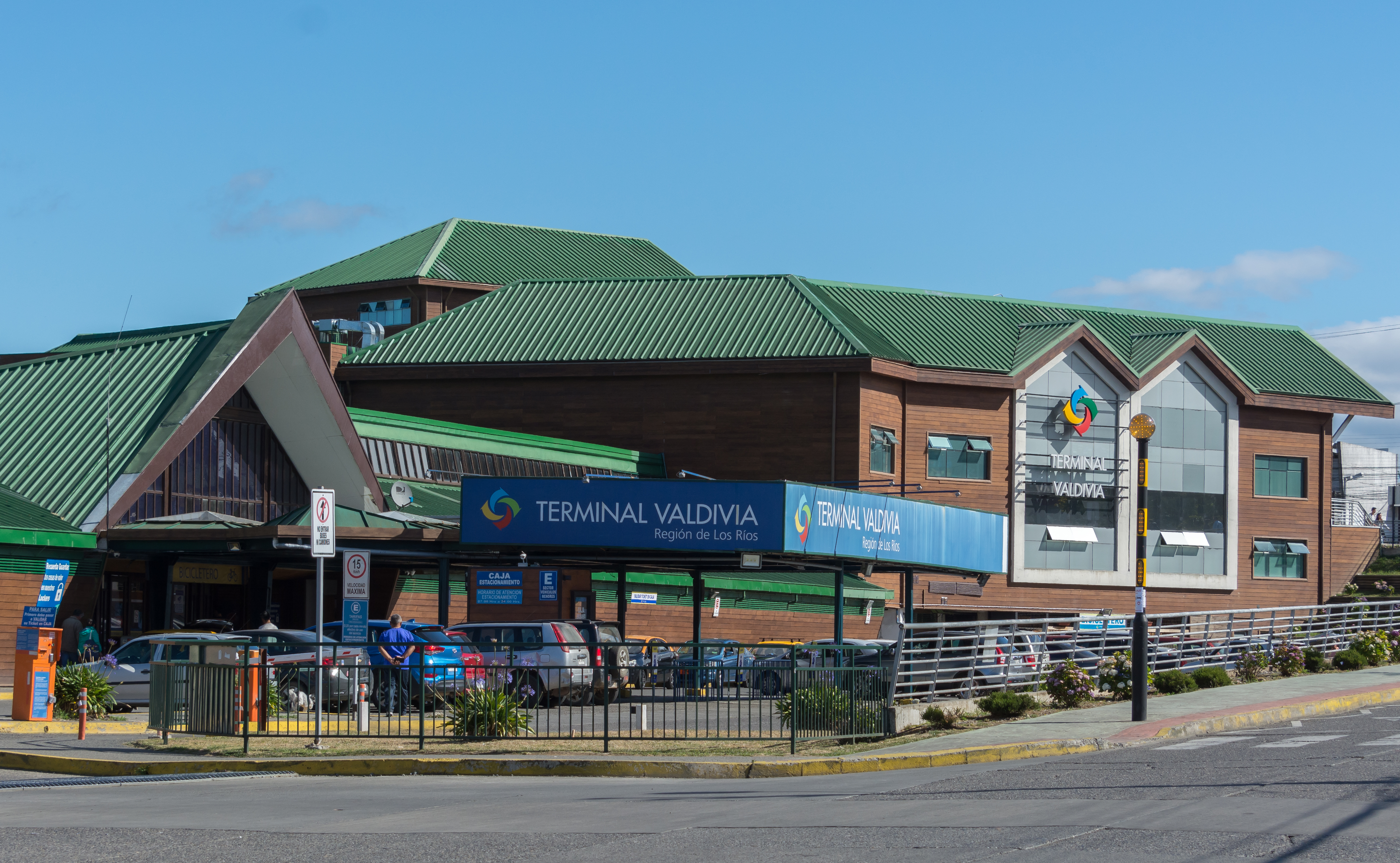 Terminal Valdivia, Valdivia, Región de Los Ríos, Chile.